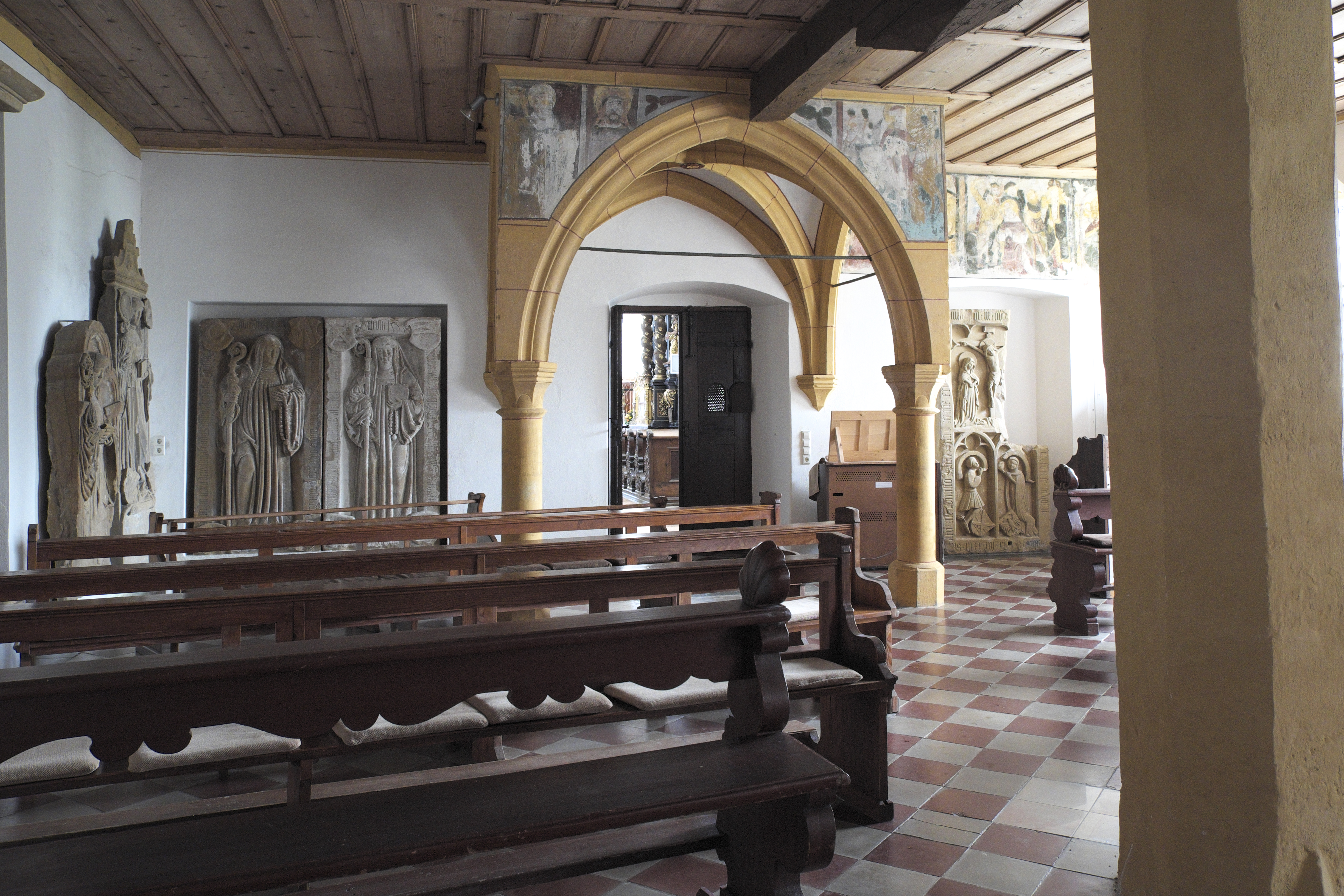 Katholische Pfarrkirche Mariä Himmelfahrt, ehemalige Kirche des Zisterzienserinnenklosters in Kirchheim am Ries im Ostalbkreis (Baden-Württemberg), Stephanskapelle mit spätgotischem Altarziborium und Wandmalereien